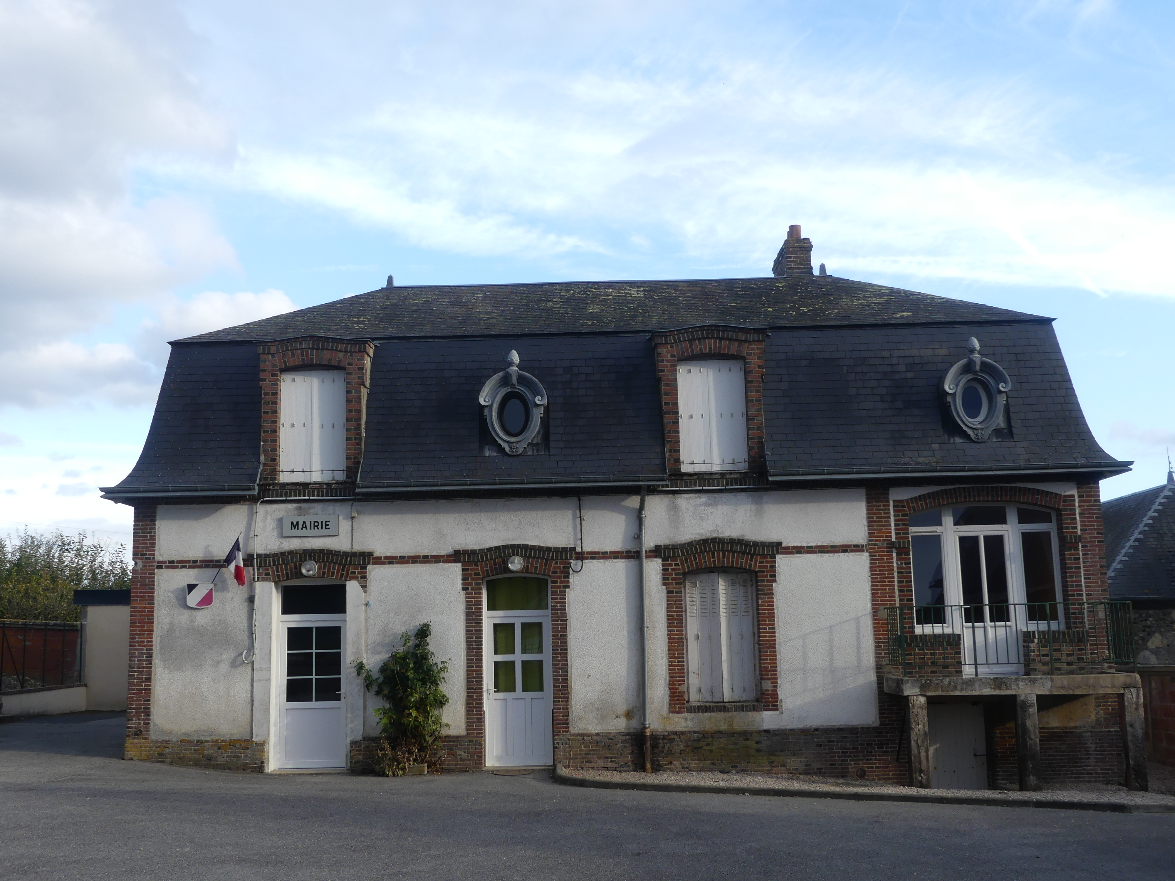 proche du chevet de l'église